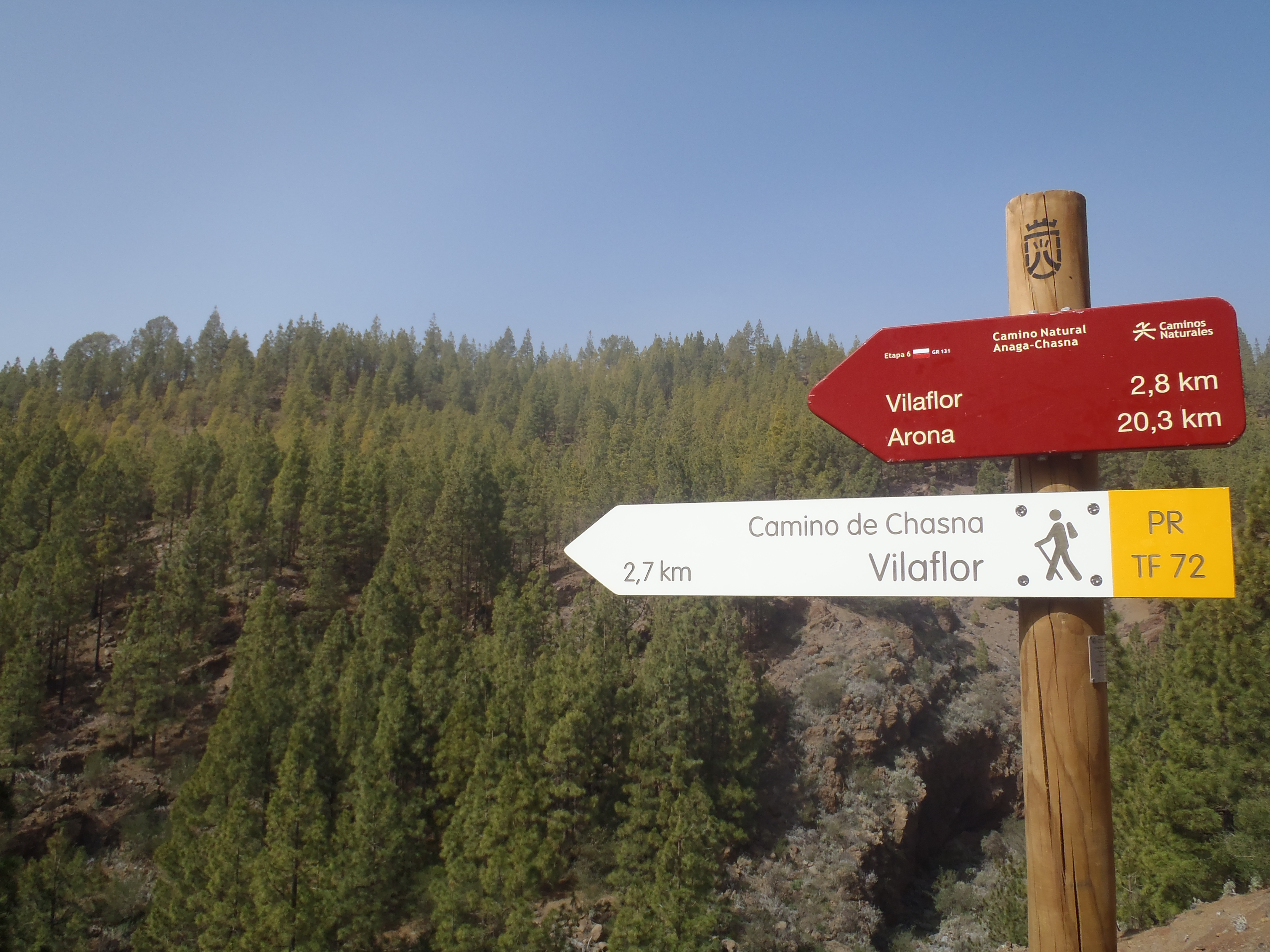 Señalización del sendero PR TF-72